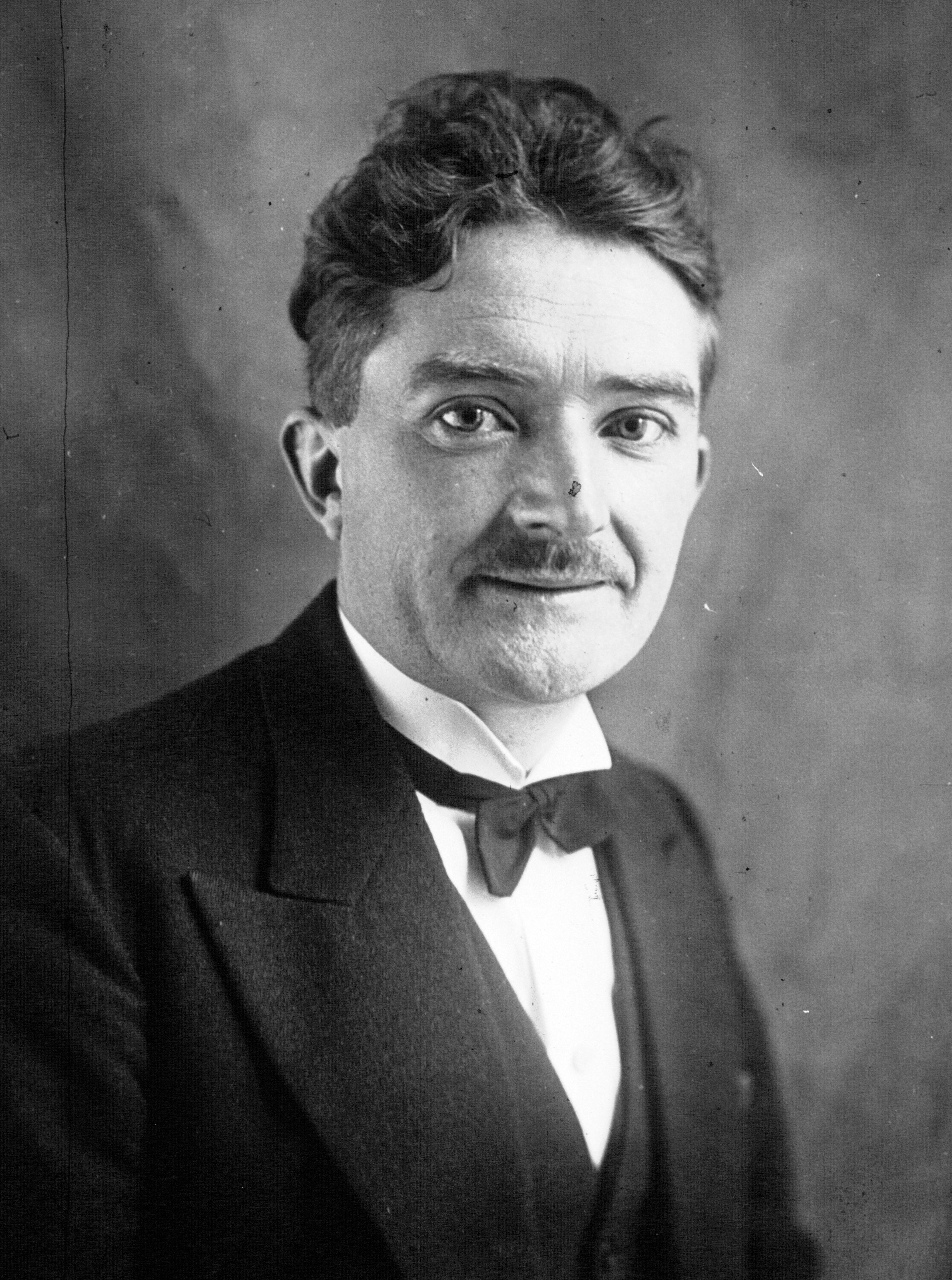 Louis L'Hévéder, député (Morbihan) [photographie de presse]